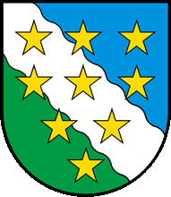 Wappen von Val-de-Travers Kanton Neuenburg Schweiz